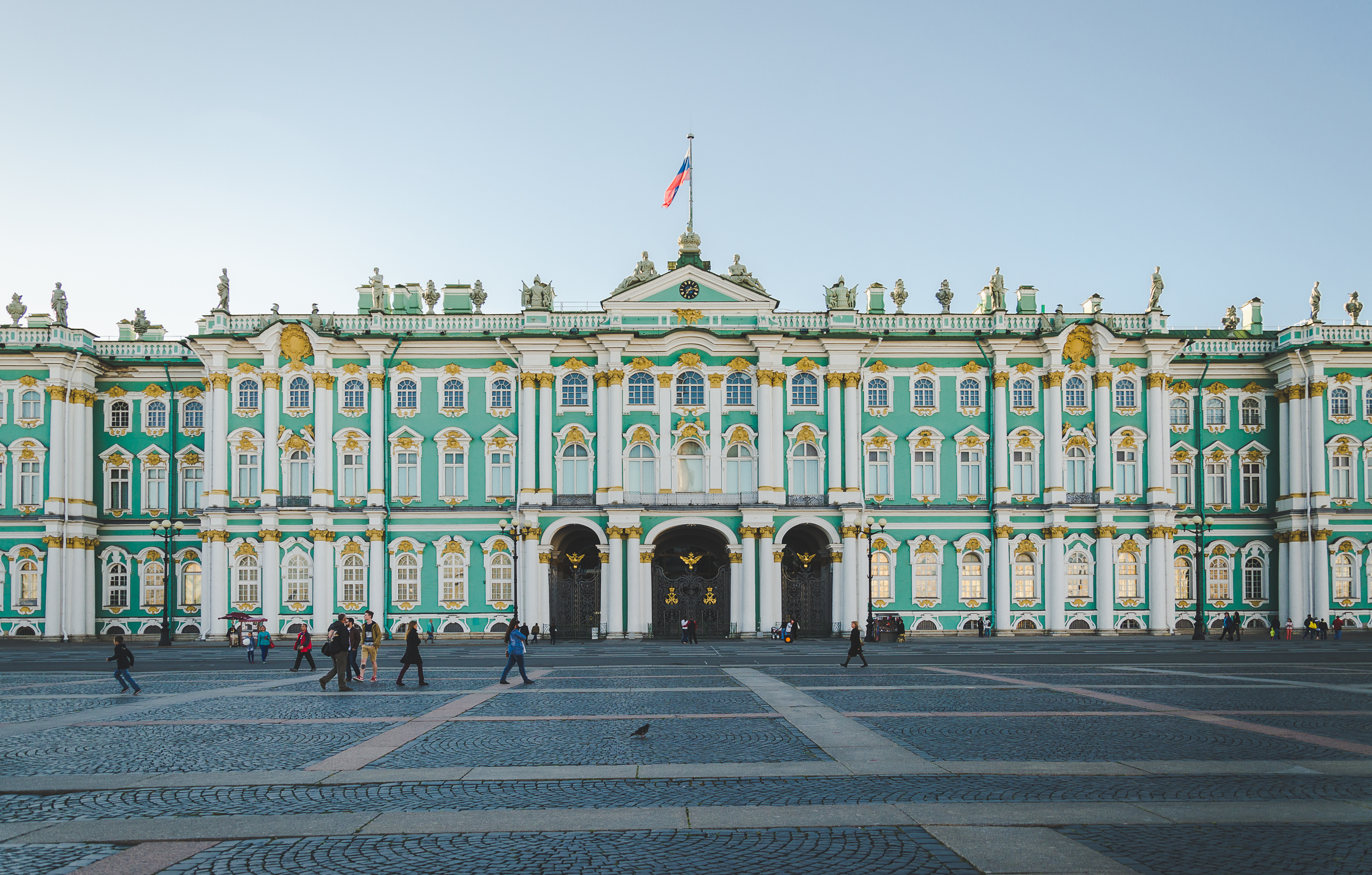 Зимний дворец: Дворцовая набережная, 38, Центральный район, Санкт-Петербург